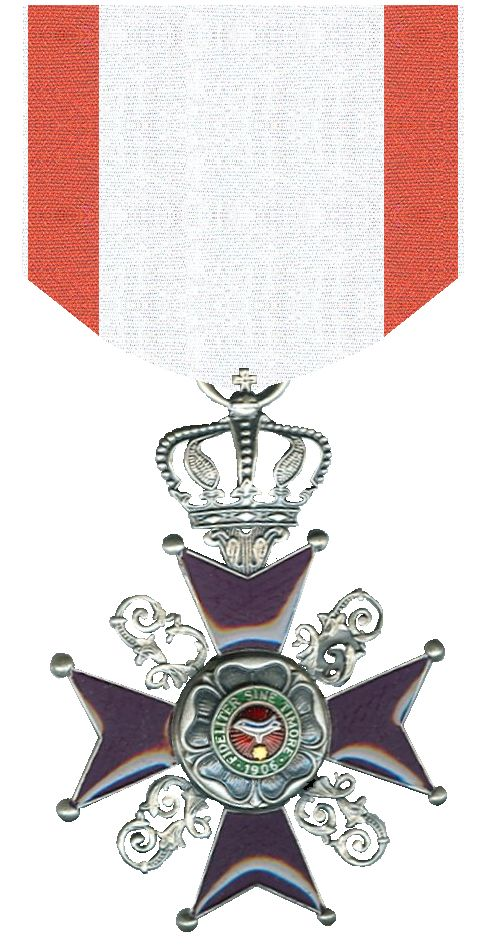 Eigen scan can een kruis in mijn verzameling. Leopold-Orden Lippe 1916 Achtergrond witgemaakt. Robert Prummel 2007